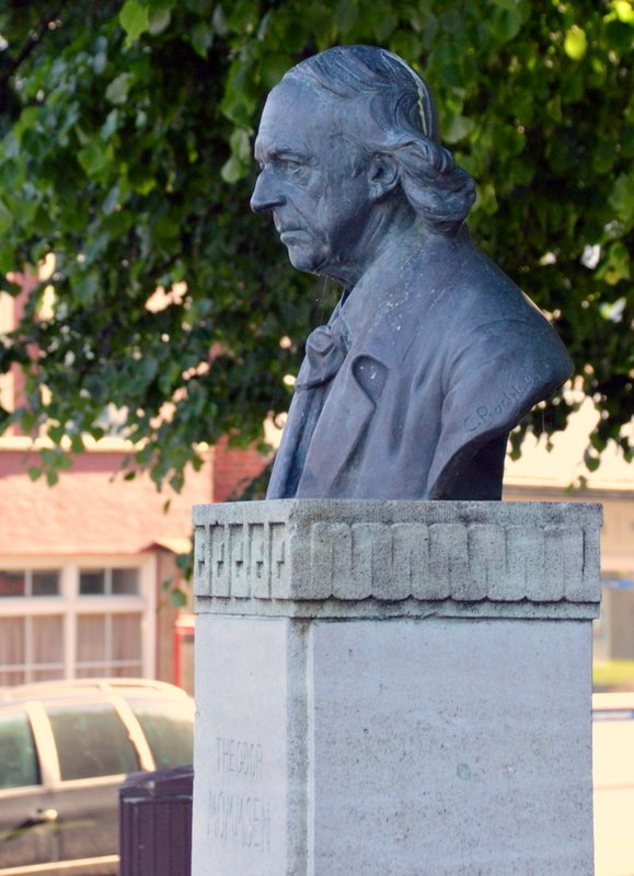 Büste von Theodor Mommsen in Garding / Eiderstedt / Nordfriesland